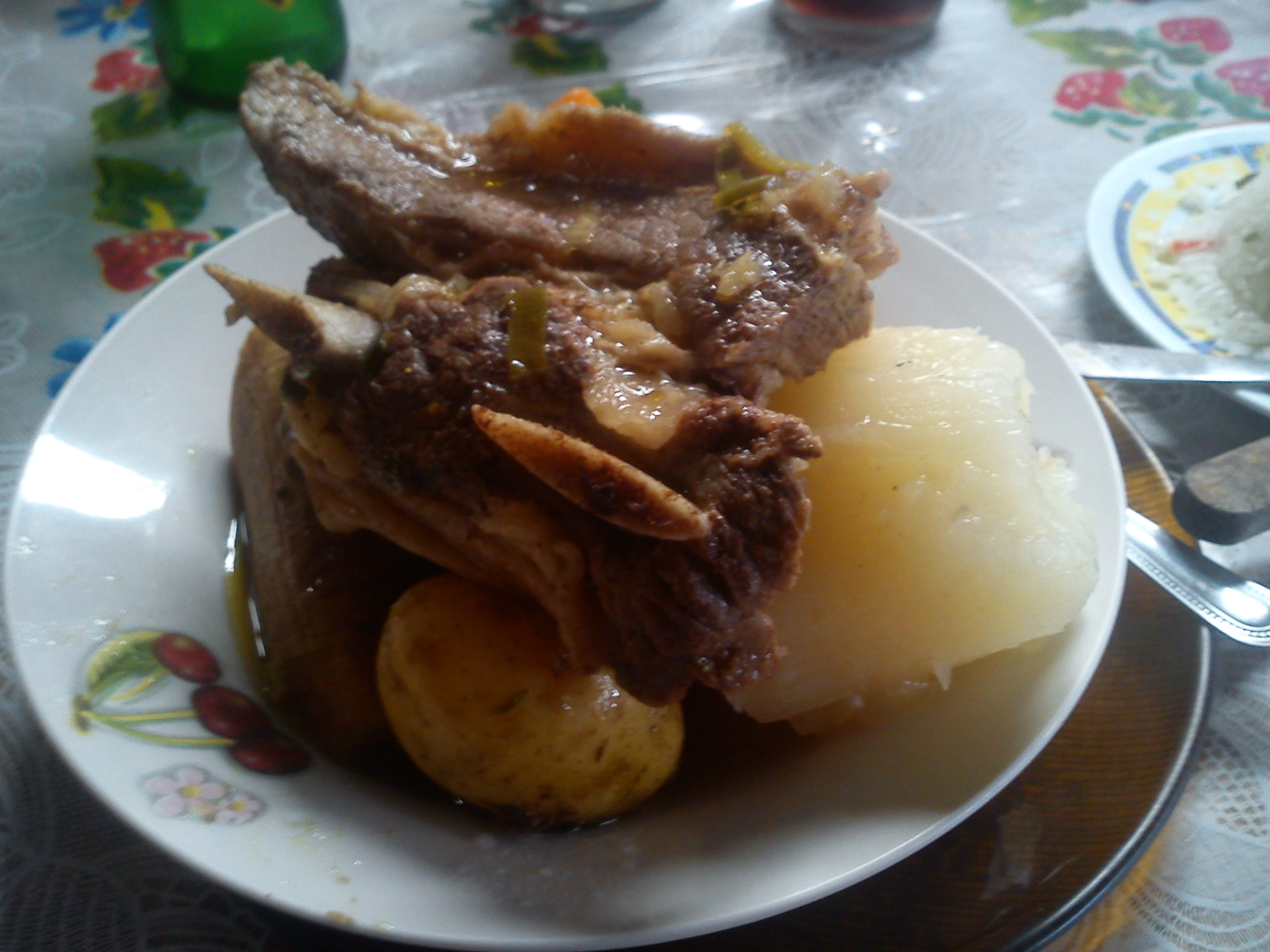 Olla de carne, platillo típico de Costa Rica compuesto de verduras y carne de res.